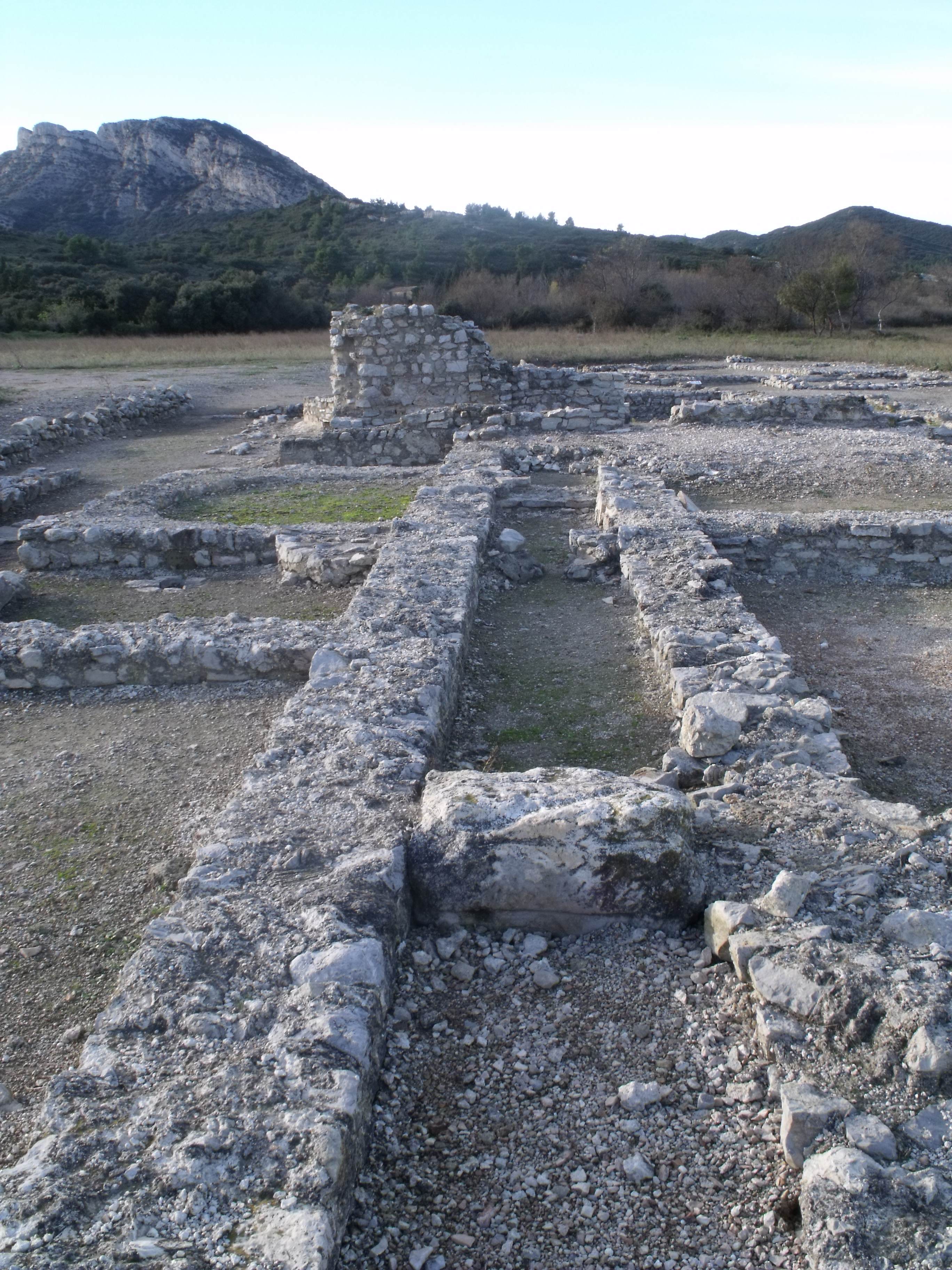 Villa gallo-romaine de Saint-Pierre de Vence, à Eyguières (Bouches-du-Rhône).